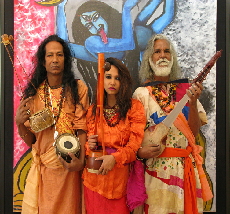 Papia Das Baul (uprostřed), Haradhan Das Baul (vlevo), Biswanath Das Baul (vpravo) foto Aleš Lang